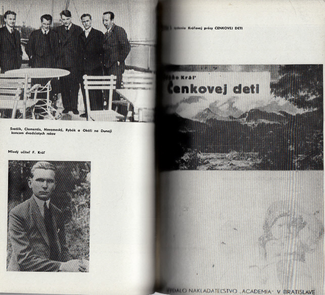 Revue DAV 1